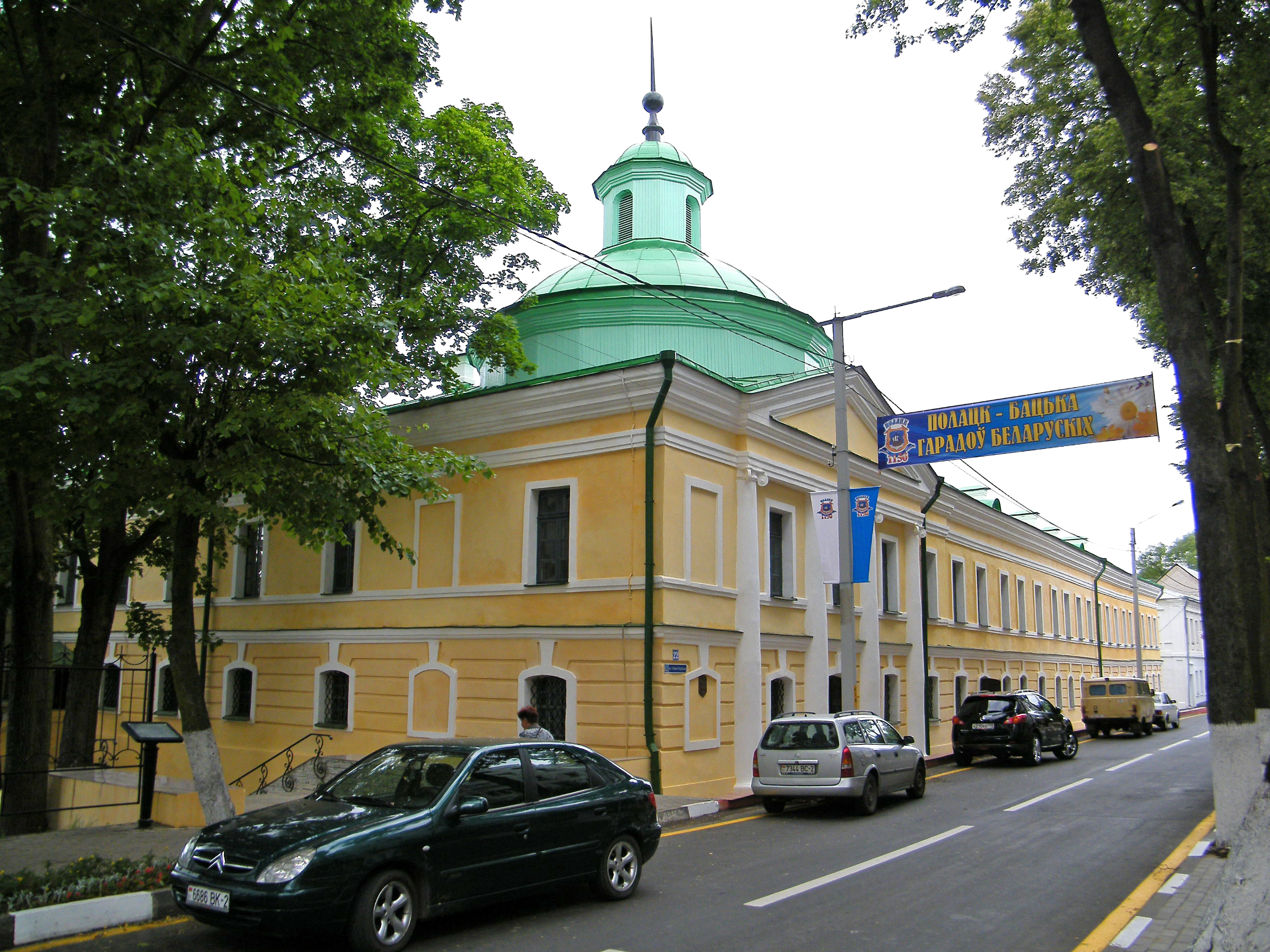 Музей книгопечатания